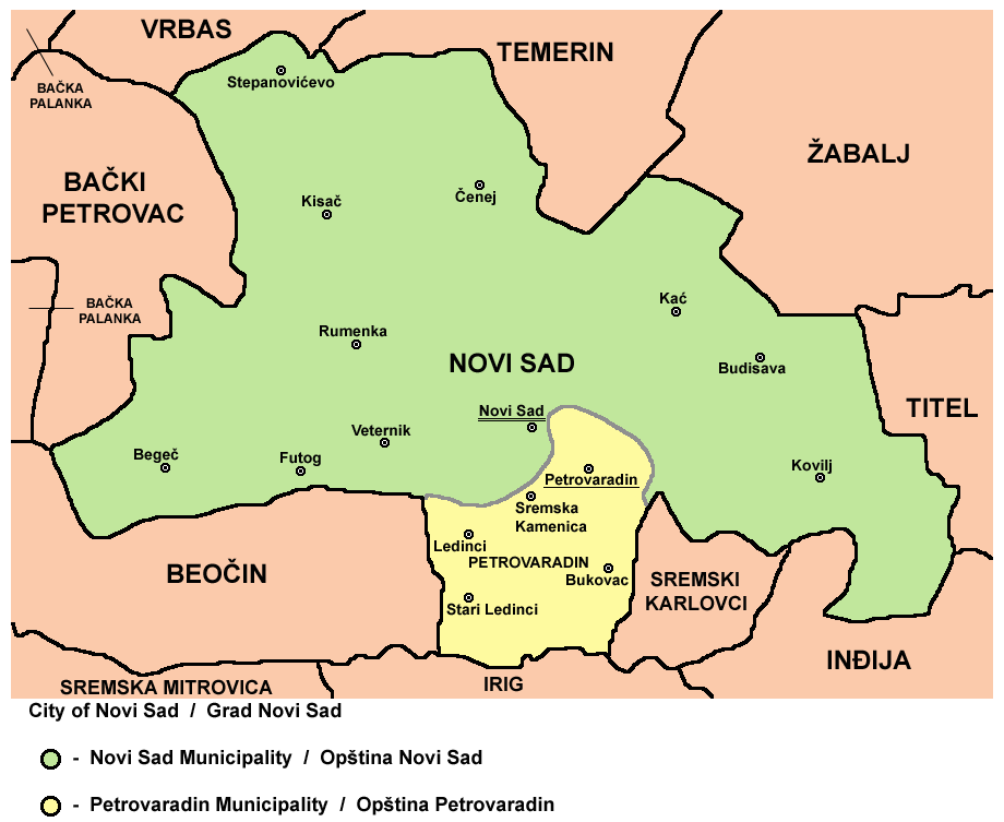 Map of Novi Sad City administrative area: Novi Sad and Petrovaradin municipalities. Mapa administrativnog područja Grada Novog Sada: Opštine Novi Sad i Petrovaradin.